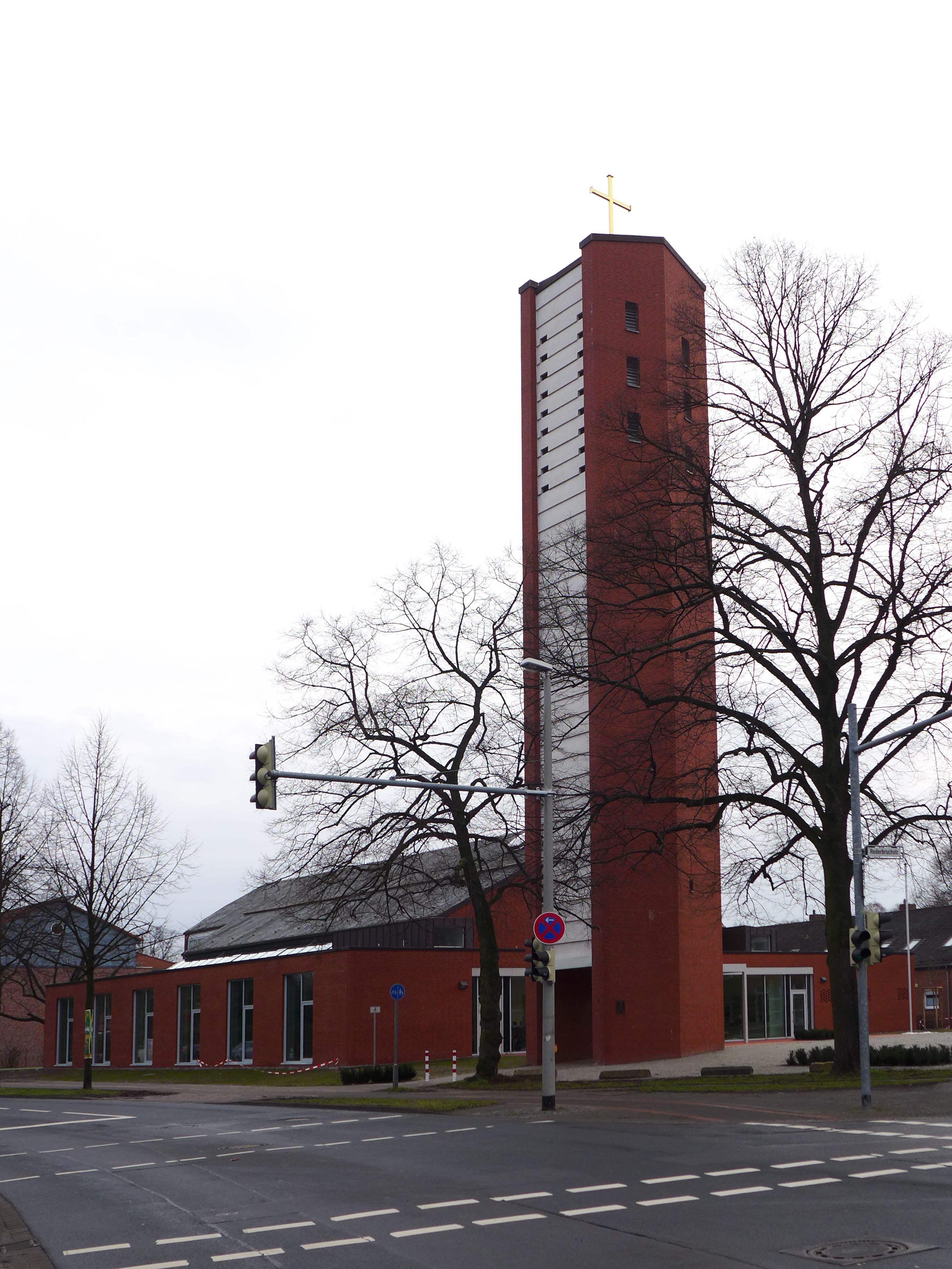 Die Matthiaskirche in Hannovers Stadtteil Groß Buchholz nach dem 2014 abgeschlossenen Umbau.